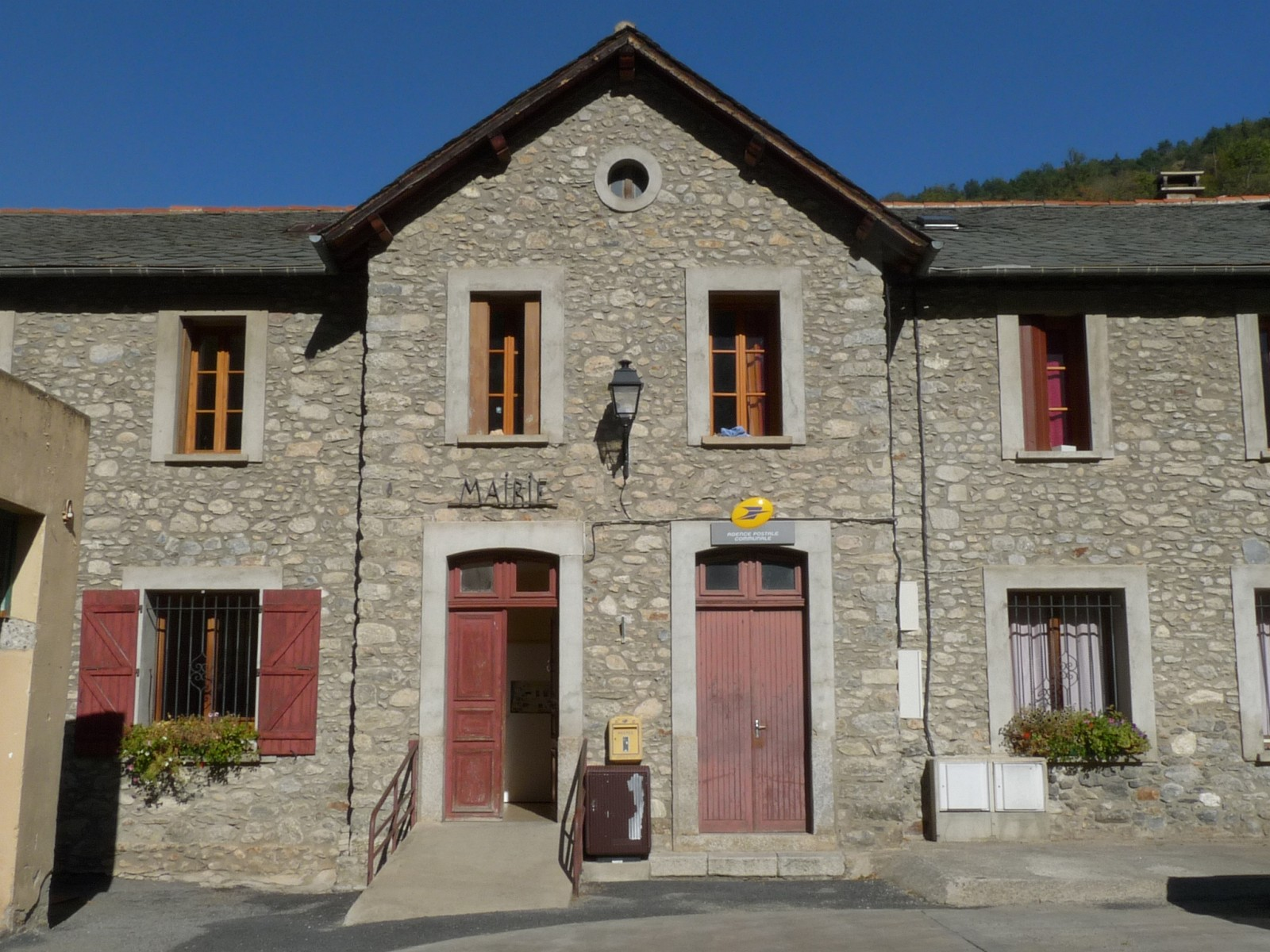 Mairie de Nyer, Pyrénées-Orientales, France